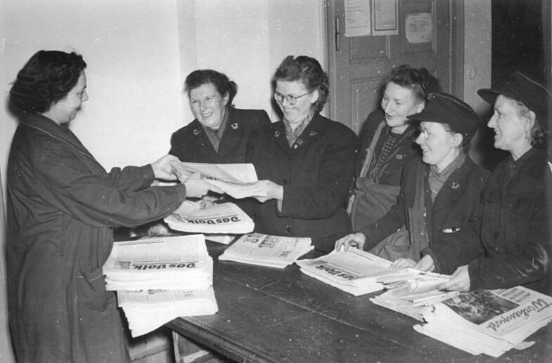 Zentralbild Schmidt 2Mot. 24.12.1954 -2694-Hauptpostamt Gotha, Republiksieger im Massenwettbewerb des III.Quartals 1954 im Massenwettbewerb der Hauptpostämter der DDR wurde zum zweiten Mal in diesem Jahr das Hauptpostamt Gotha Siegerbetrieb und von der Regierung mit der Wanderfahne des Ministerrates, verbunden mit einer Prämie von DM 8.000.- ausgezeichnet. Die vorbildlichen Erfolge sind das Ergebnis des kameradschaftlichen Erfahrungsaustausches der Kollegen untereinander vor allem bei der Zeitungs- und Postzustellung, sowie im Schalterdienst.UBz: Die tägliche Zeitungsausgabe im Postzeitungsvertrieb mit den besten Zeitungszustellern (v.l.n.r.) Ursula Ludwig (Zeitungsausgabe), Clara Kött, Martha Krieger, Elisabeth Klein, Hedwig Hampf und die Kollegin Irma Sonnebald. " Wir freuen uns, dass wir im zweiten und dritten Quartal Sieger im Wettbewerb geworden sind, wenn es auch manchmal nicht so einfach war, so sind wir doch stolz, dass unsere kollektive Zusammenarbeit ihre Früchte getragen hat." Dies ist die Meinung dieser 5 Zeitungszusteller.